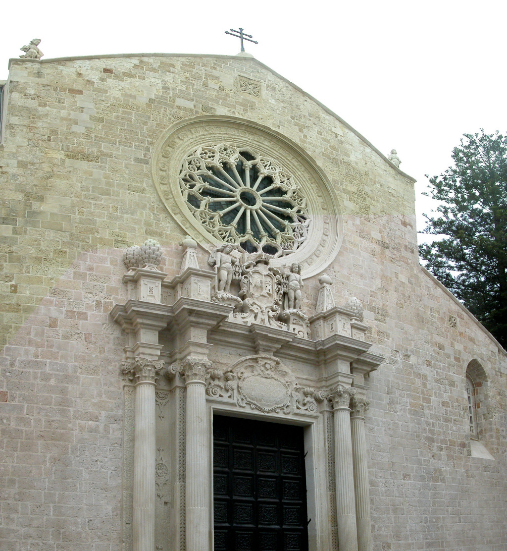 Autore e data: Stefano Trezzi (yoruno sparisci sott'acqua 13:55, 6 mag 2007 (CEST)) Fonte: scatto da me eseguito. Descrizione: Otranto, cattedrale, 26 aprile 2007 Licenza Licenza d'uso: Creative Commons BY-SA 3.0